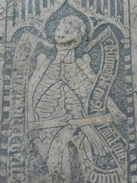 Dalle funéraire d'Odon II de Luyrieu (Prioriale du Bourget du Lac)